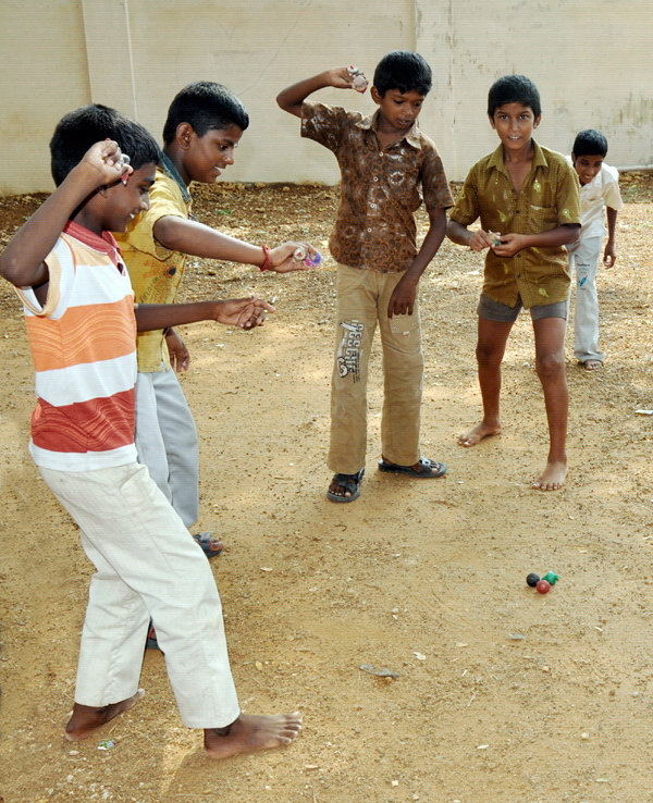 வட்டத்துக்குள் வைக்கப்பட்டிருக்கும் பம்பரத்தைச் குறிவைத்து தமது பம்பரங்களை ஏவிவிடும் தமிழ் சிறுவர்கள். இடம் மதுரை அருகே உள்ள ஒரு கிராமம்.